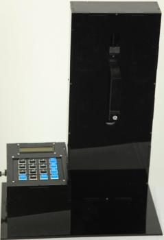 لایه نشان غوطه وری